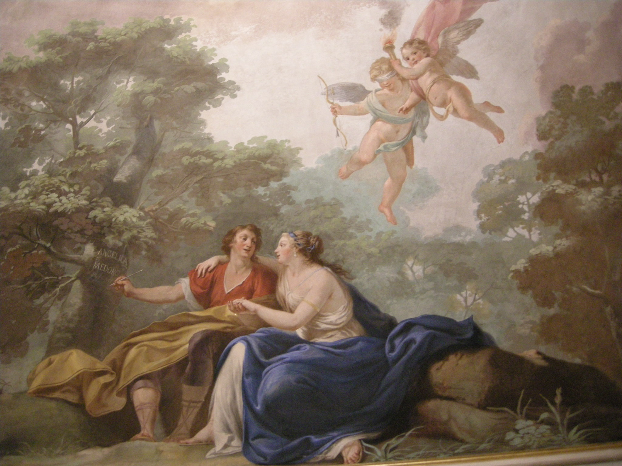 Sala dell'orlando furioso, affreschi di Giuseppe Antonio Fabbrini